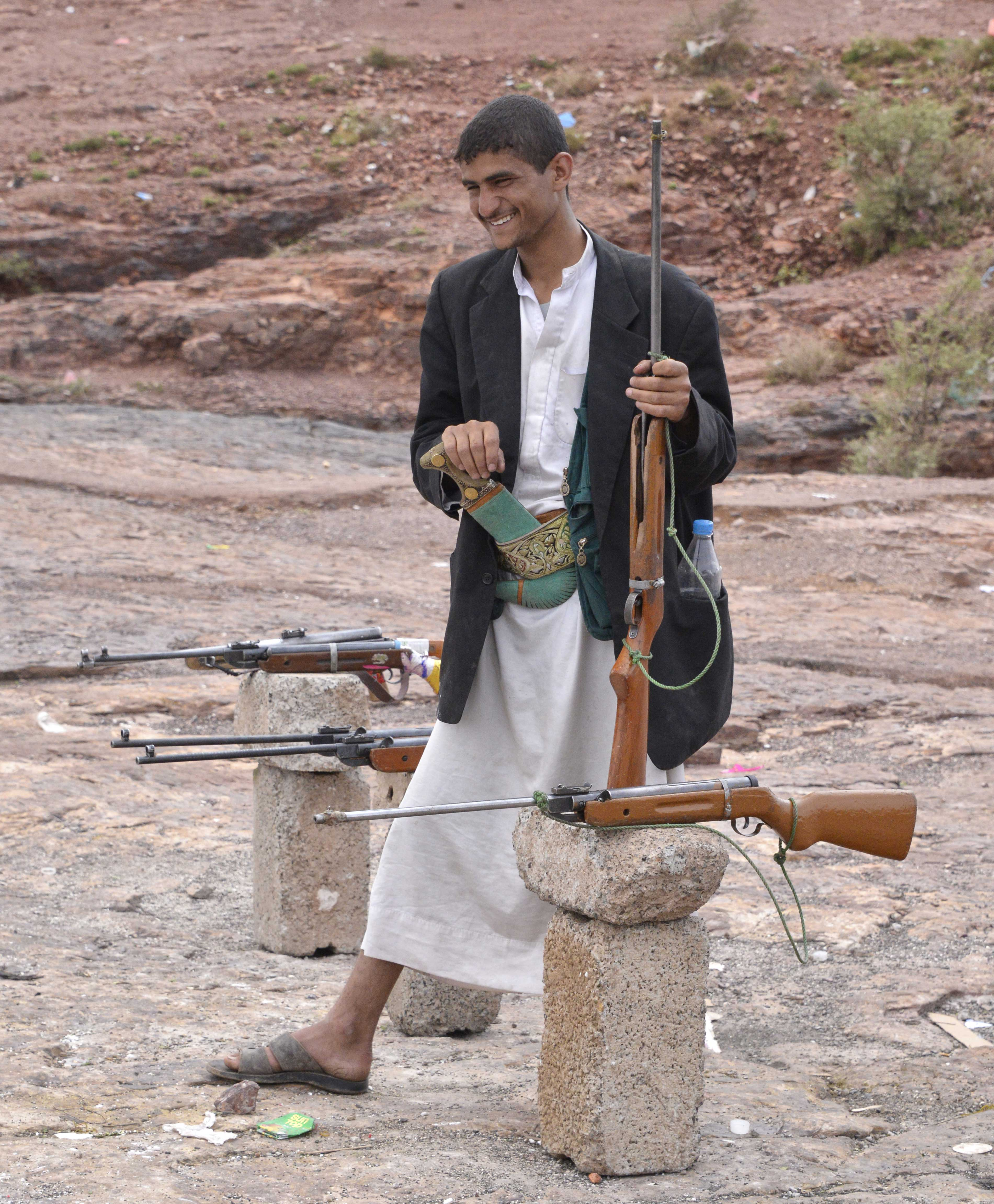 BB Guns, Yemen